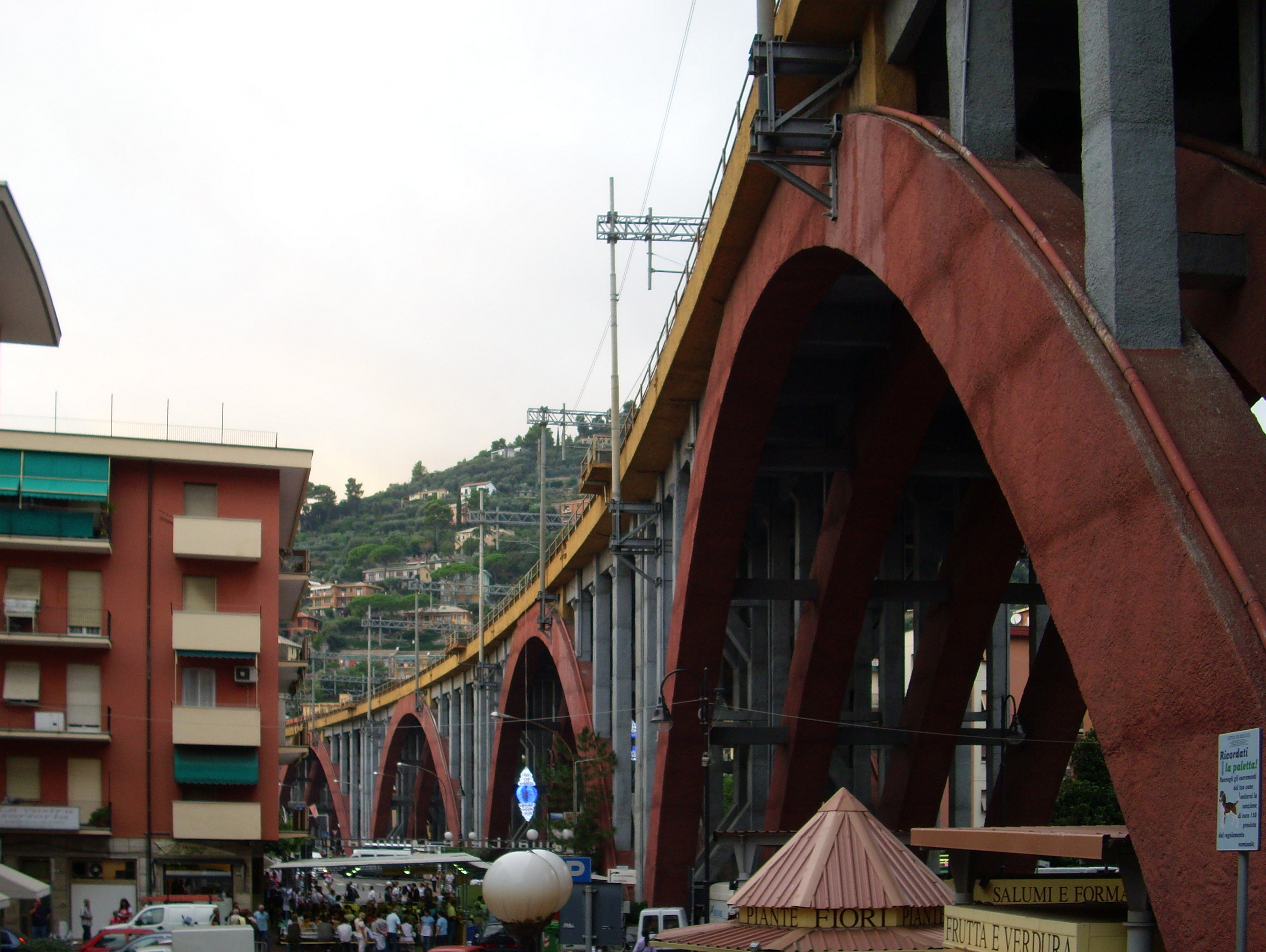 Il ponte ferroviario che attraversa Recco